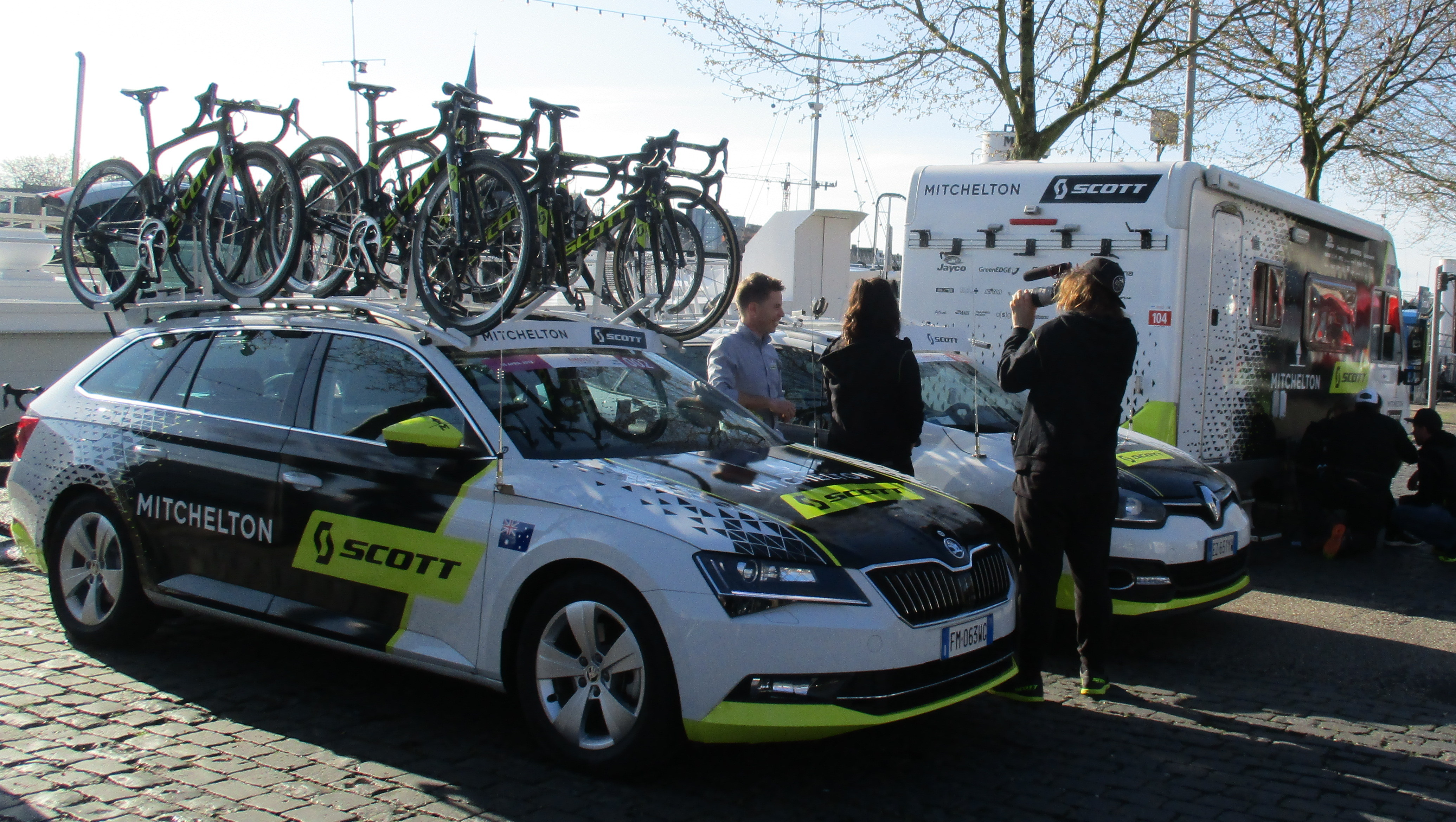 Start van de Amstel Gold Race Ladies Edition 2018 in Maastricht.